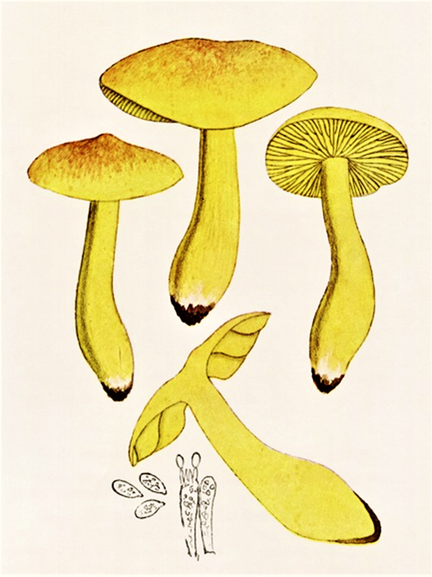 Giacomo Bresadola: Tricholoma sulphureum (Bull., 1784) P.Kumm. (1871)